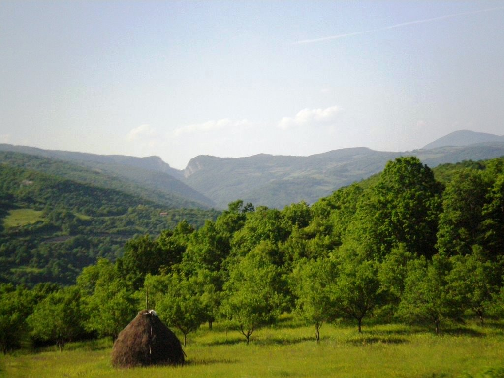 Donji Dabrac. Opština Mrkonjić Grad.